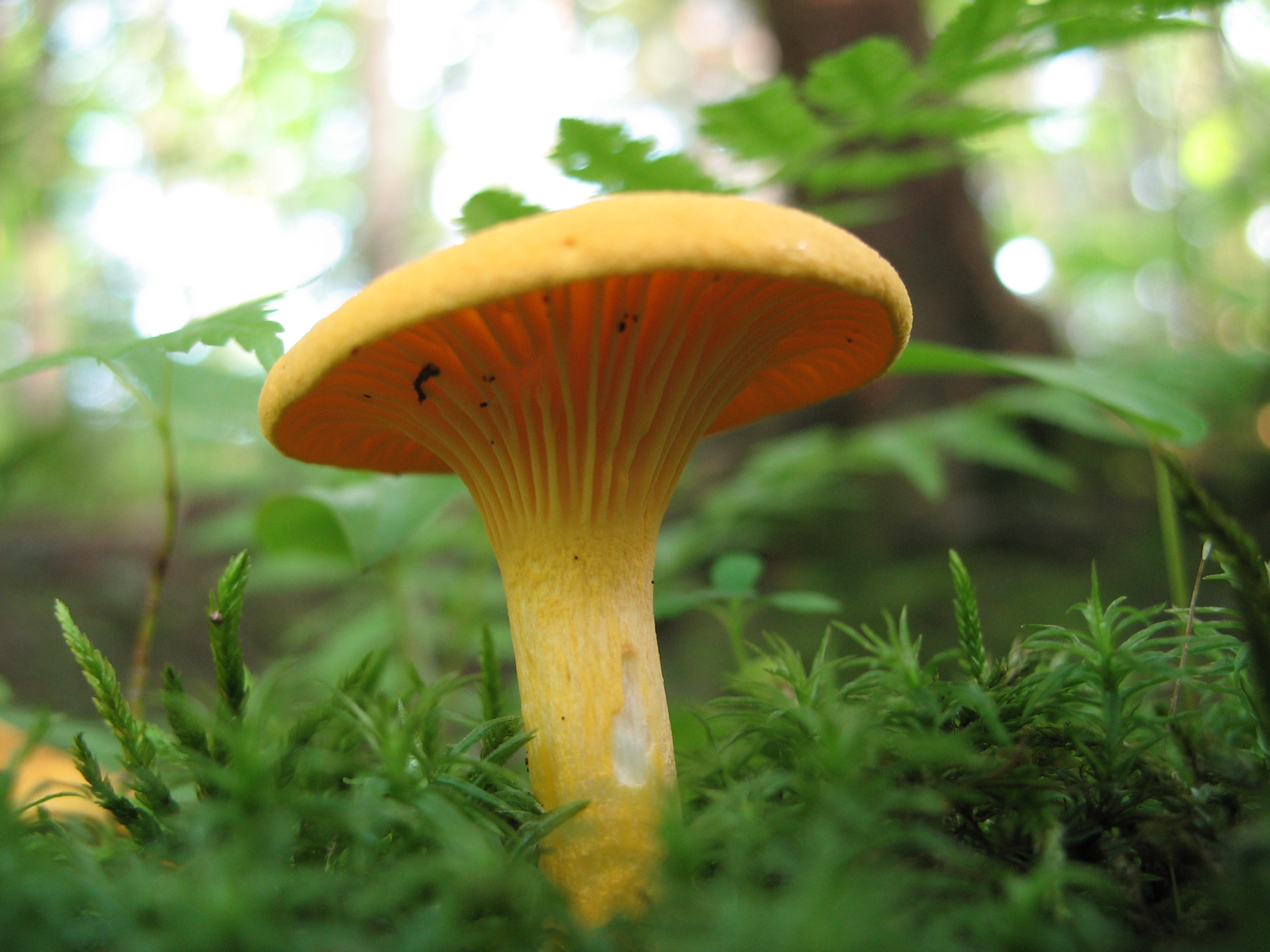 chanterelle